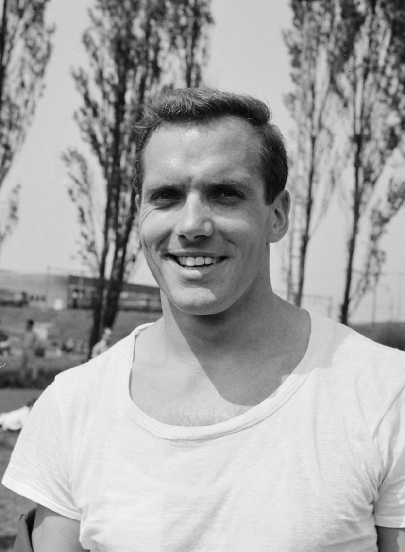 Internationale atletiekwedstrijden, Eef Kamerbeek (kop)